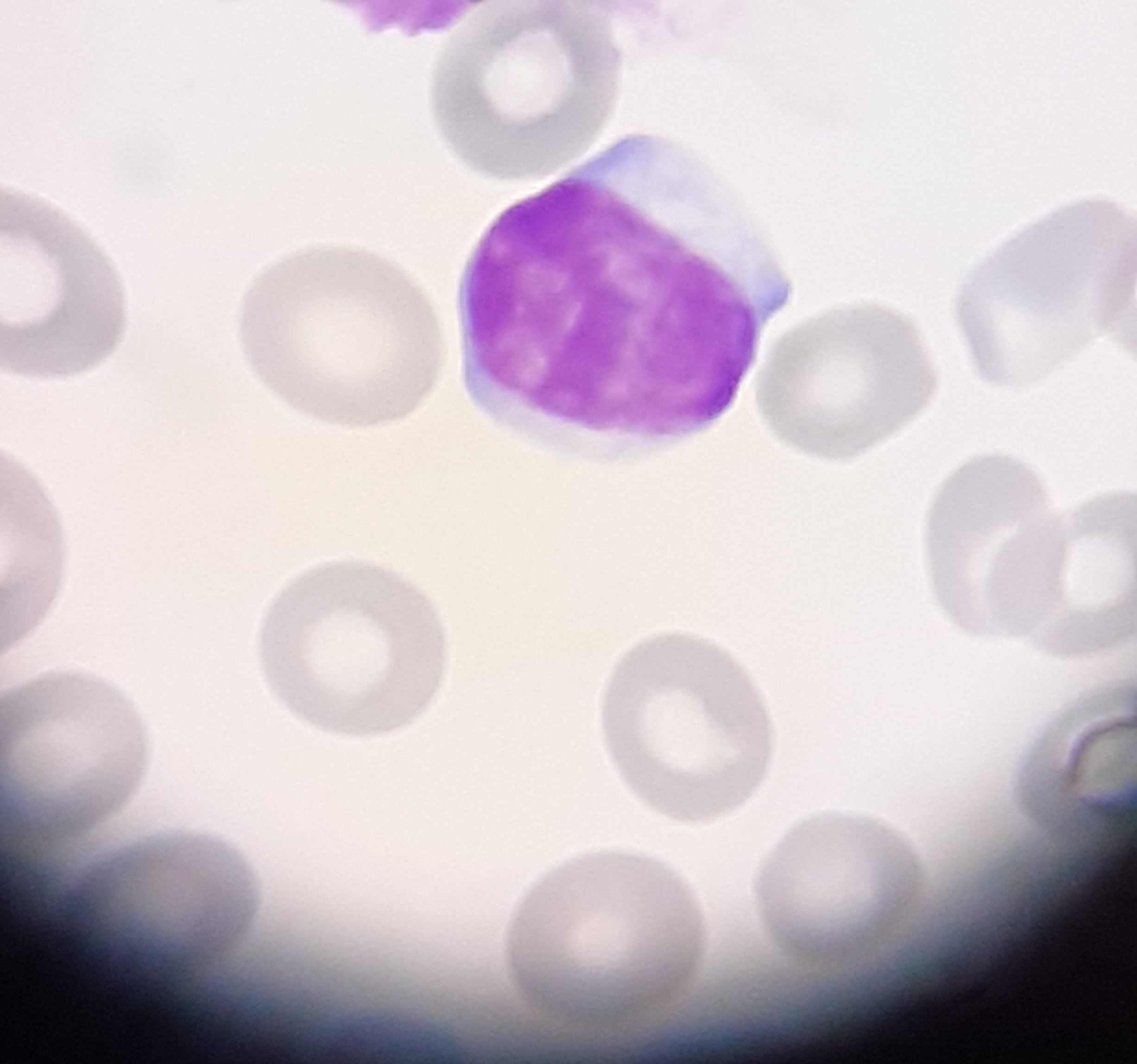 Blasto de linfocito en una leucemia linfoblástica aguda (LLA), vista con tinción de May-Grünwald-Giemsa modificada para urgencias a 1.000 aumentos